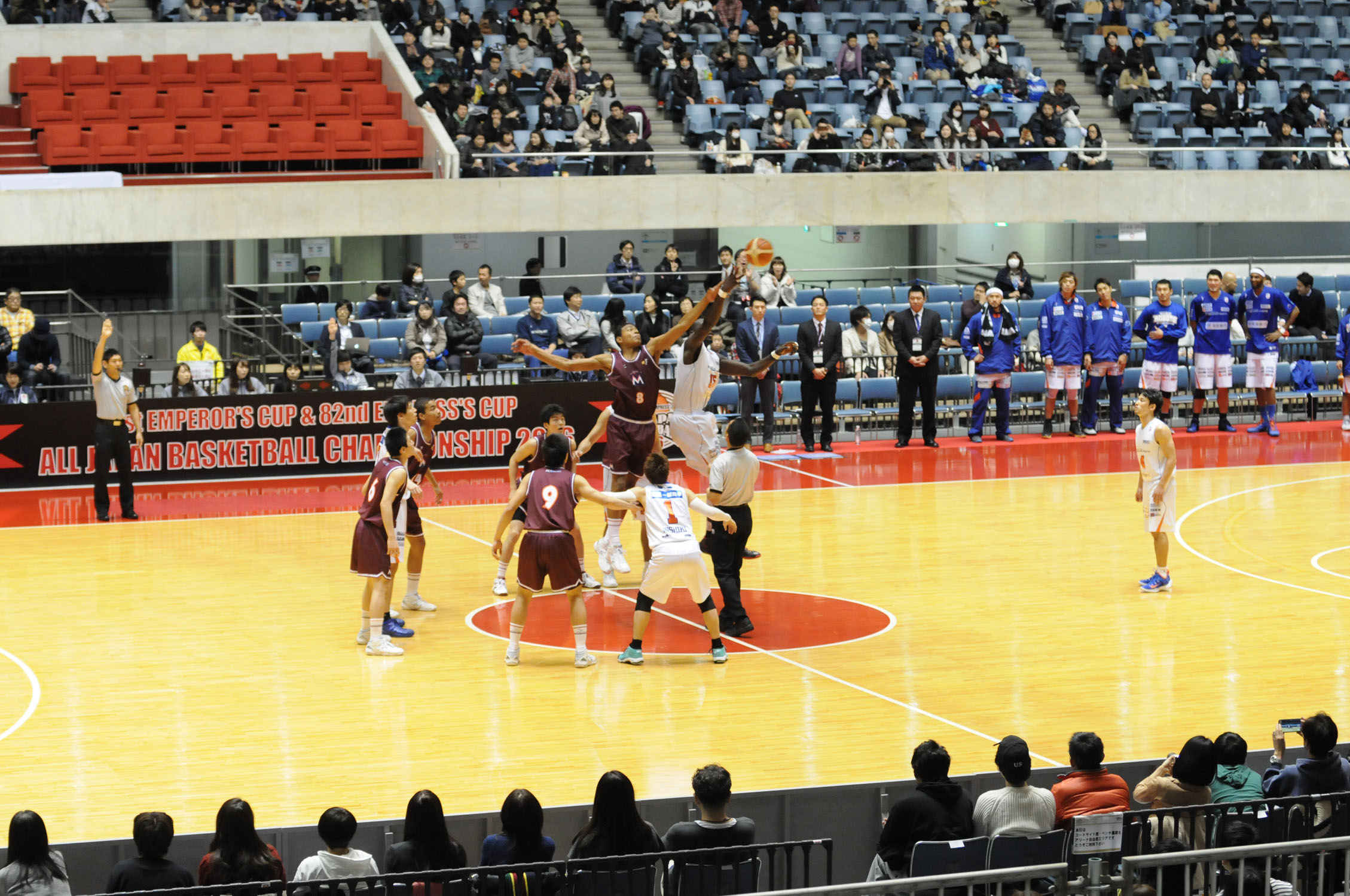 2016年全日本総合バスケットボール選手権大会二回戦、サイバーダインつくばロボッツ対明成高校。代々木第一体育館で。